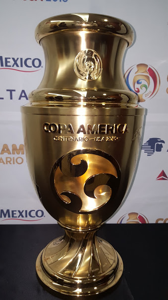 ​Copa América trophy